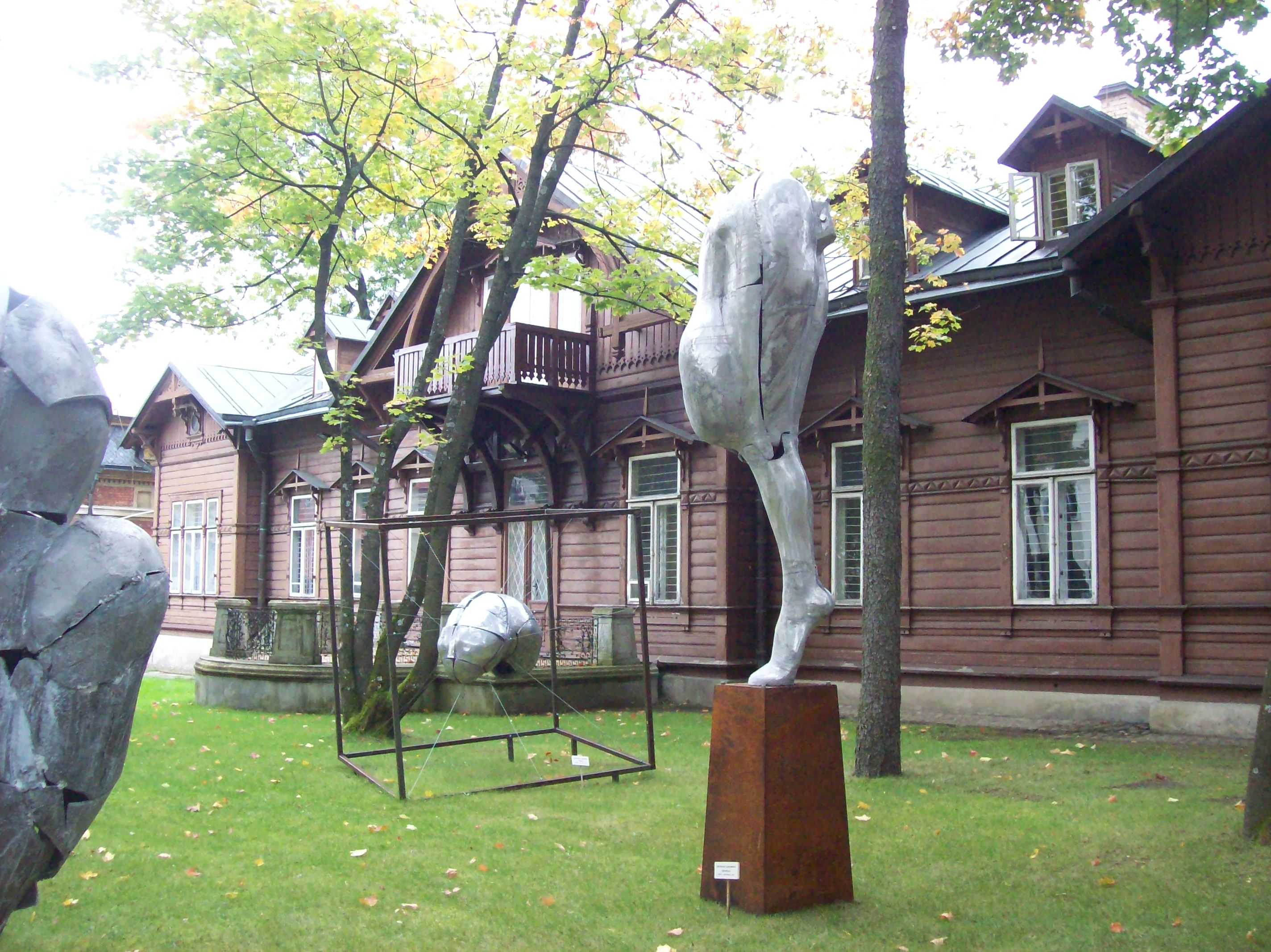 Białystok, ul. Świętojańska 17 - willa, drewn. XIX w. (zabytek nr A-305 z 14.06.1975)